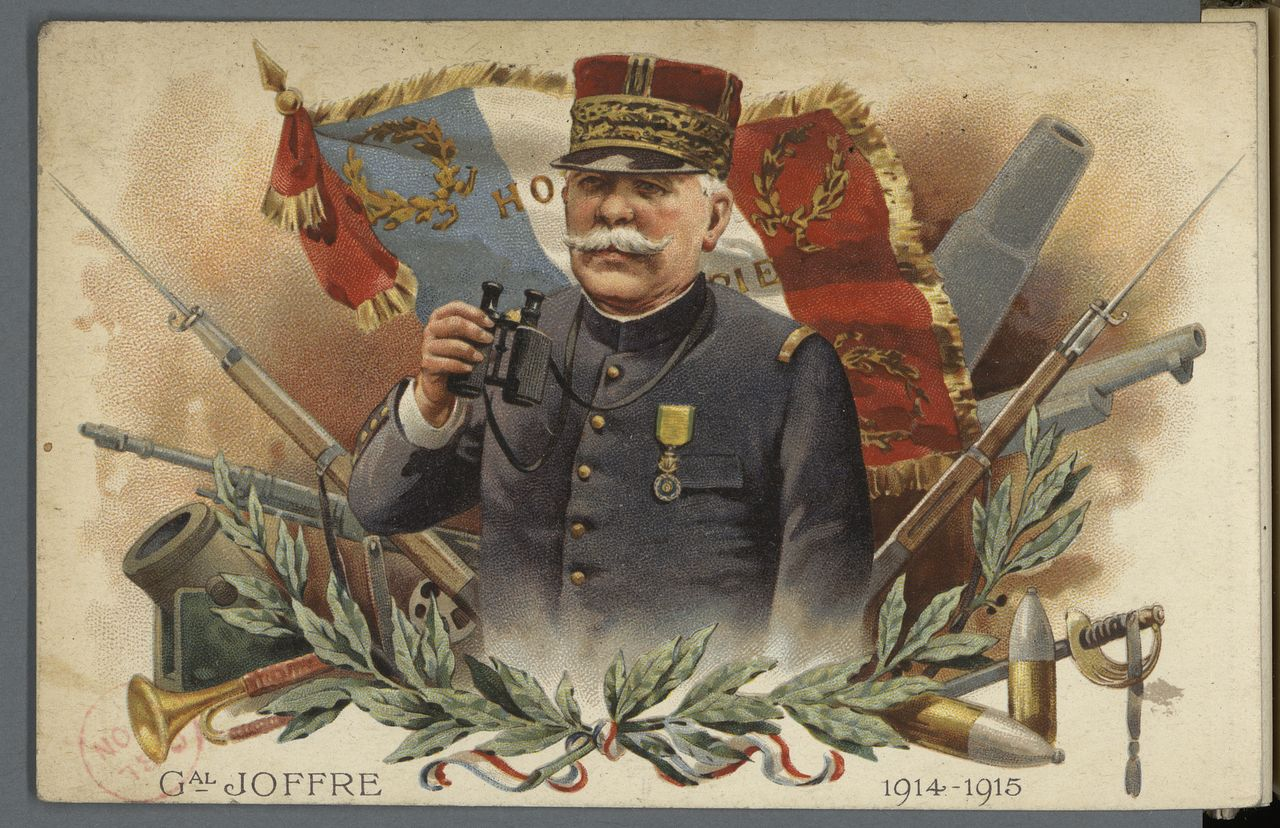 Carte postale à l'effigie du Général Joffre